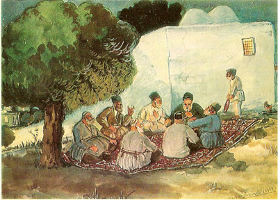 Азим Азимзаде, "На бакинских дачах".